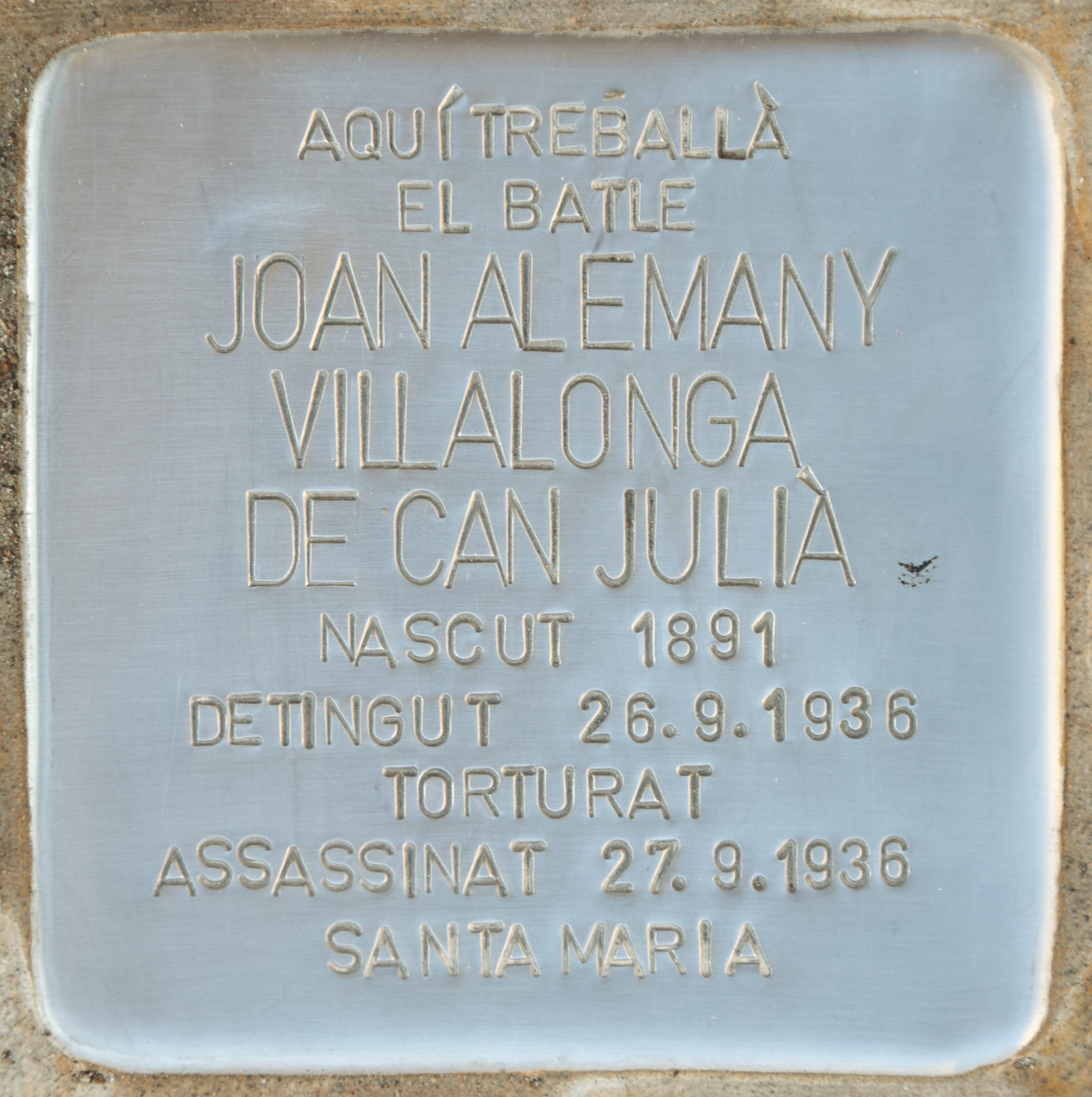 Remembrance Stone in Buger